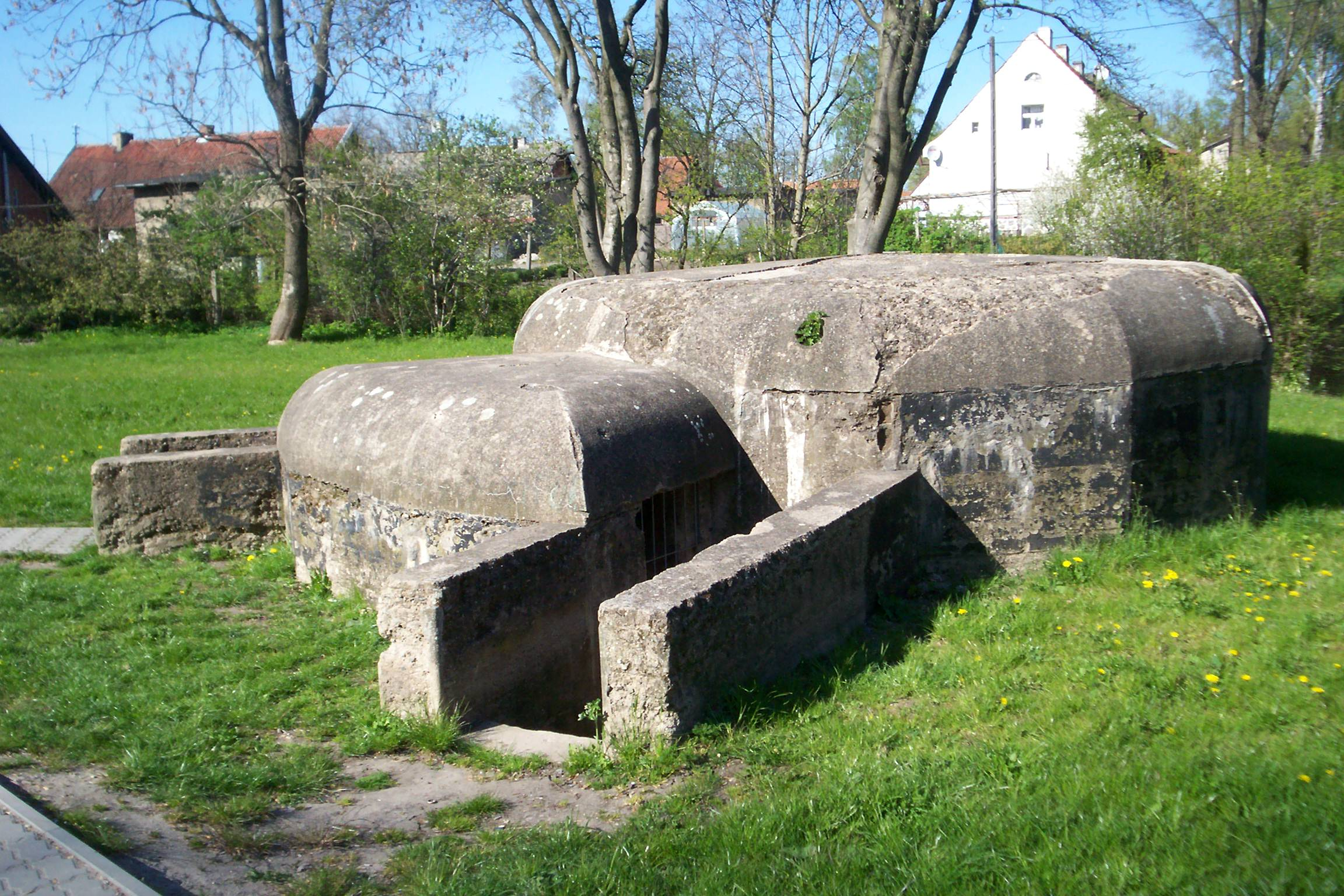 Jeden z dwóch schronów przeciwodłamkowych obrony lotniczej przy rondzie Solidarności w Kętrzynie